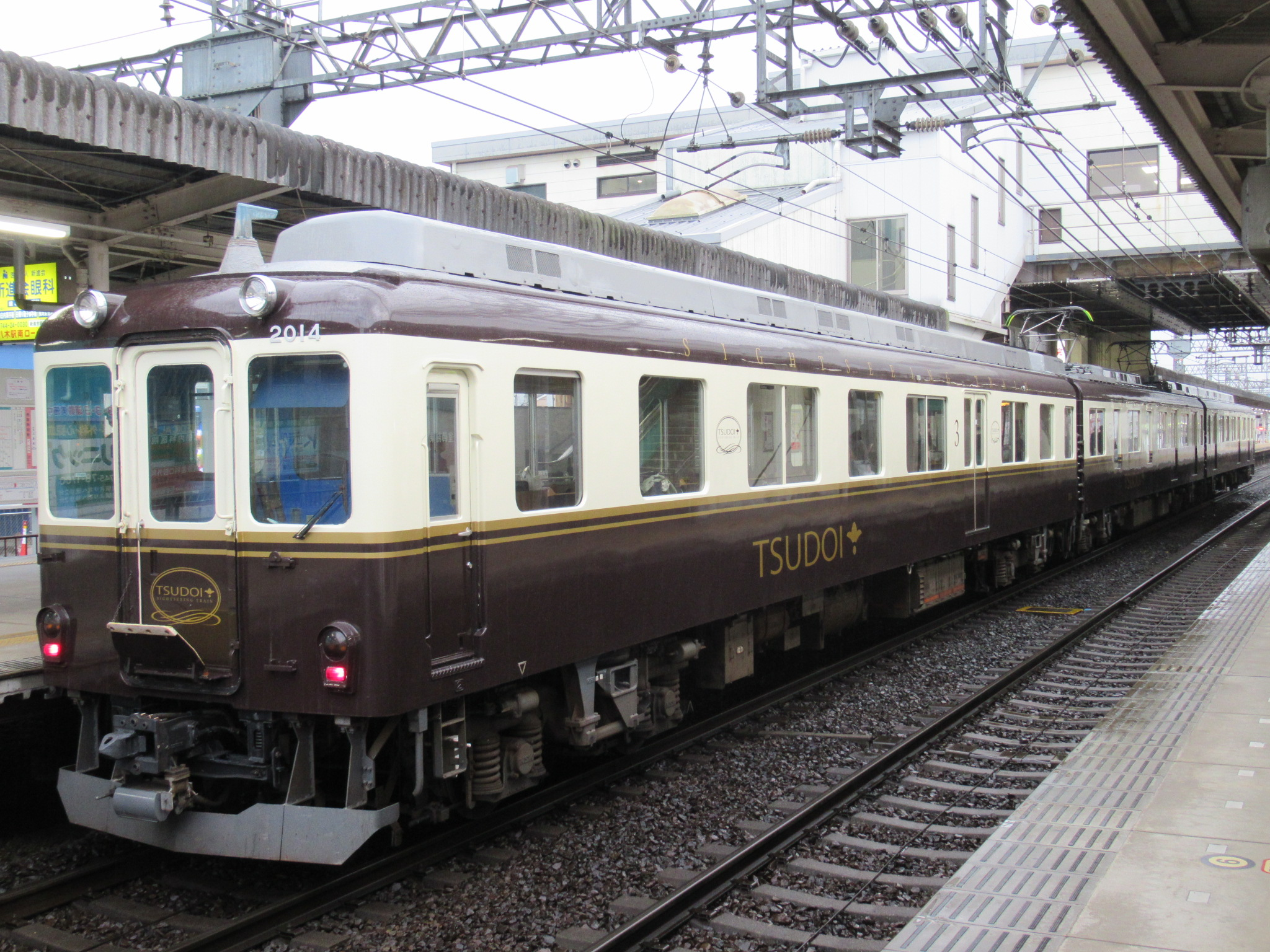 近鉄2014「つどい」新塗装 五位堂駅